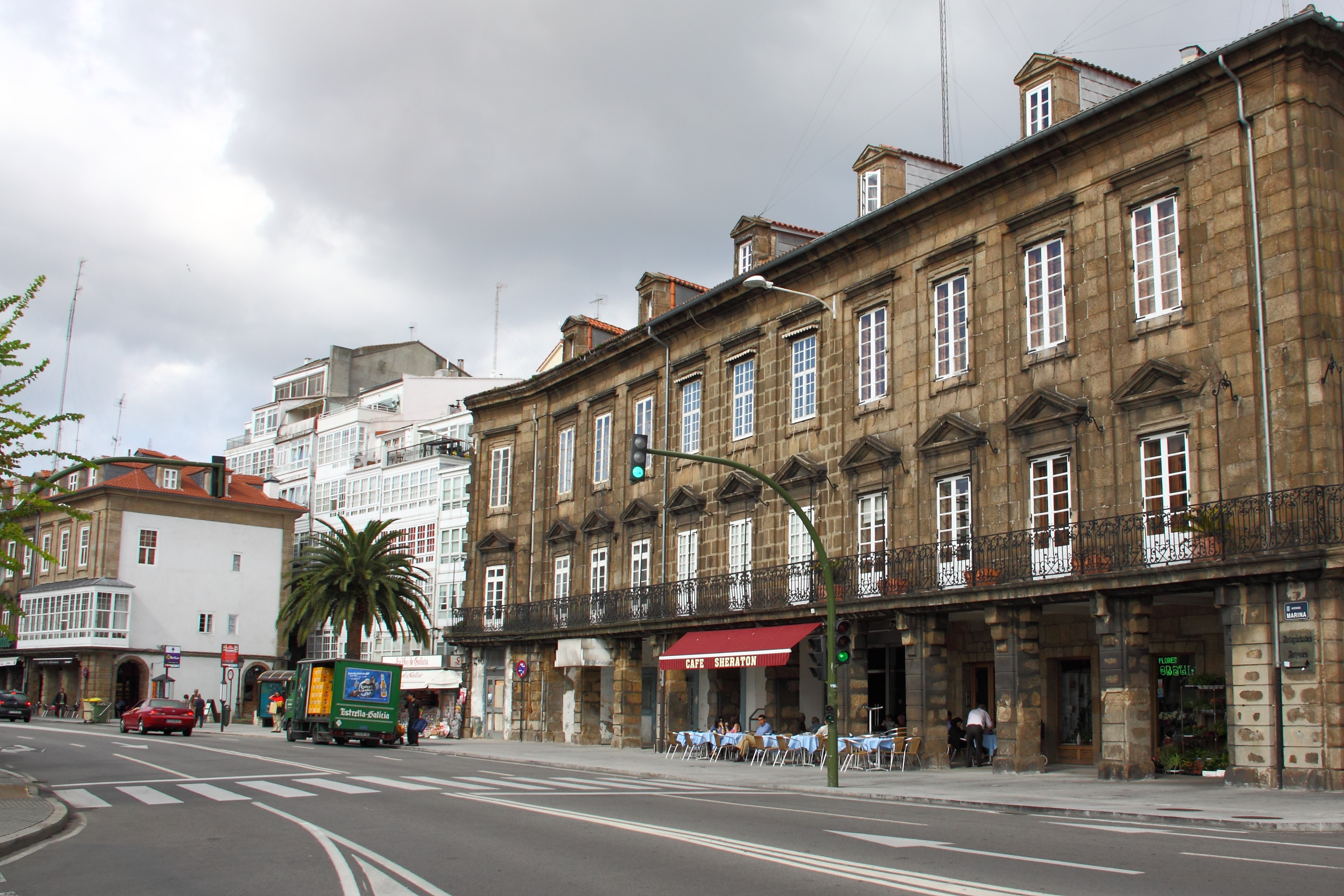 Casa Paredes, A Coruña